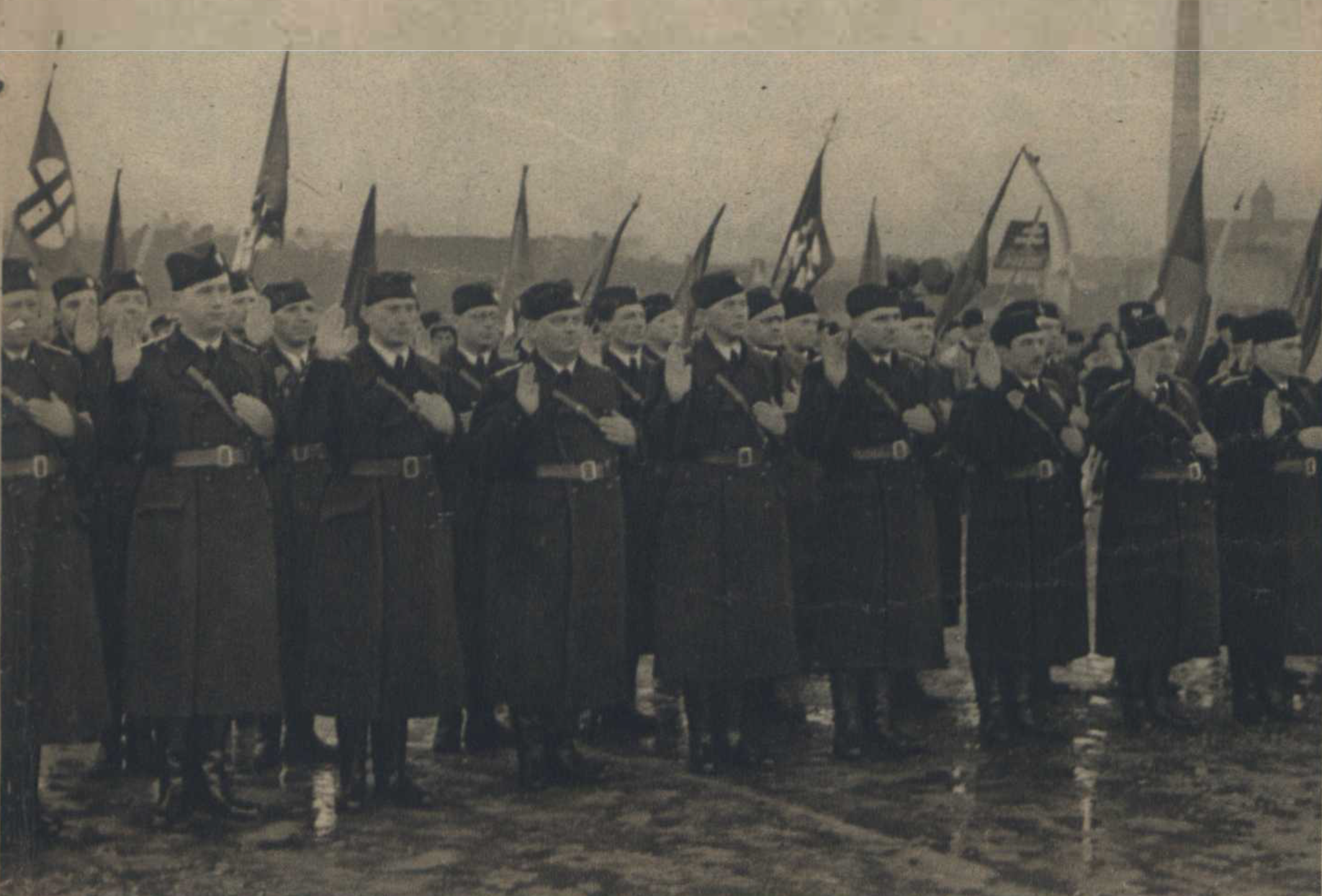 "velitelia a dôstojníci Hlinkovej gardy počas prísahy"